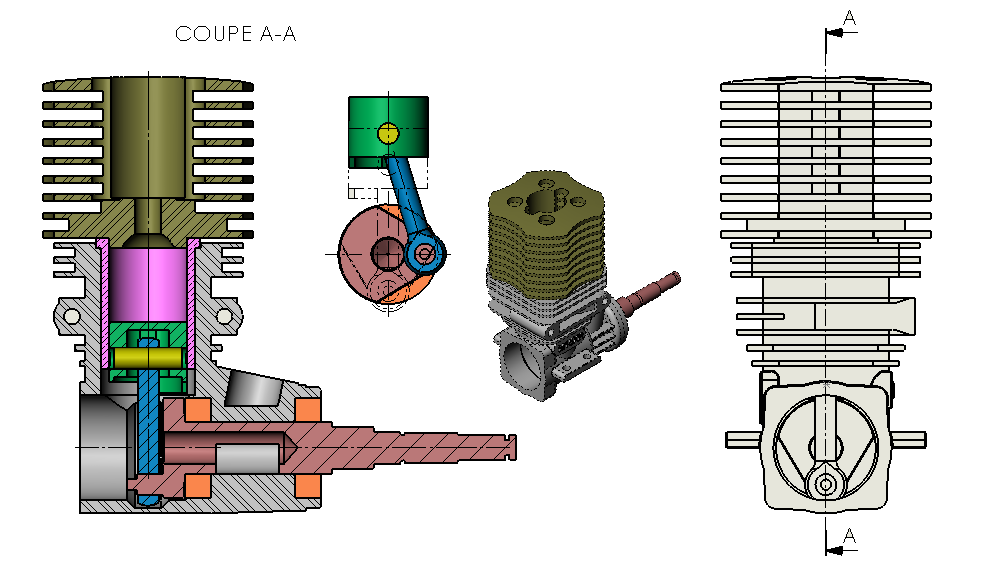 Plan d'un micor moteur technique 2,5cm3. Mise en plan Solidworks